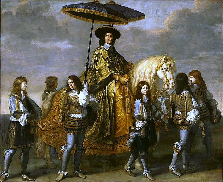 Pierre Séguier, premier magistrat du royaume, fut le principal protecteur de Le Brun pendant sa jeunesse. Ce portrait fut sans doute peint dans le contexte de l’Entrée royale de Louis XIV et de Marie-Thérèse à Paris, le 26 août 1660, après leur mariage à Saint-Jean-de-Luz le 9 juin de la même année.